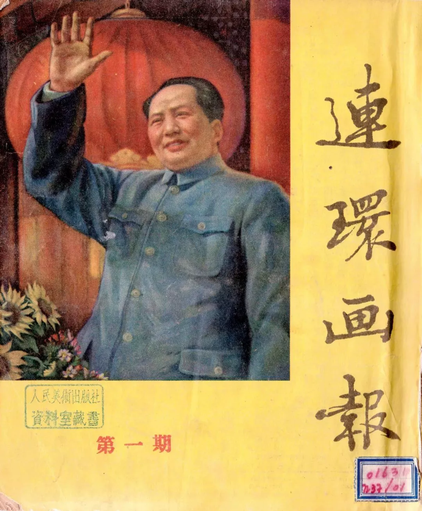 1951年，第一期《连环画报》正式出版发行，成为人民美术出版社的第一本期刊。创刊号封面的油画，为毛泽东在天安门上挥手的情形，潘崮绘制。茅盾为封面题字。